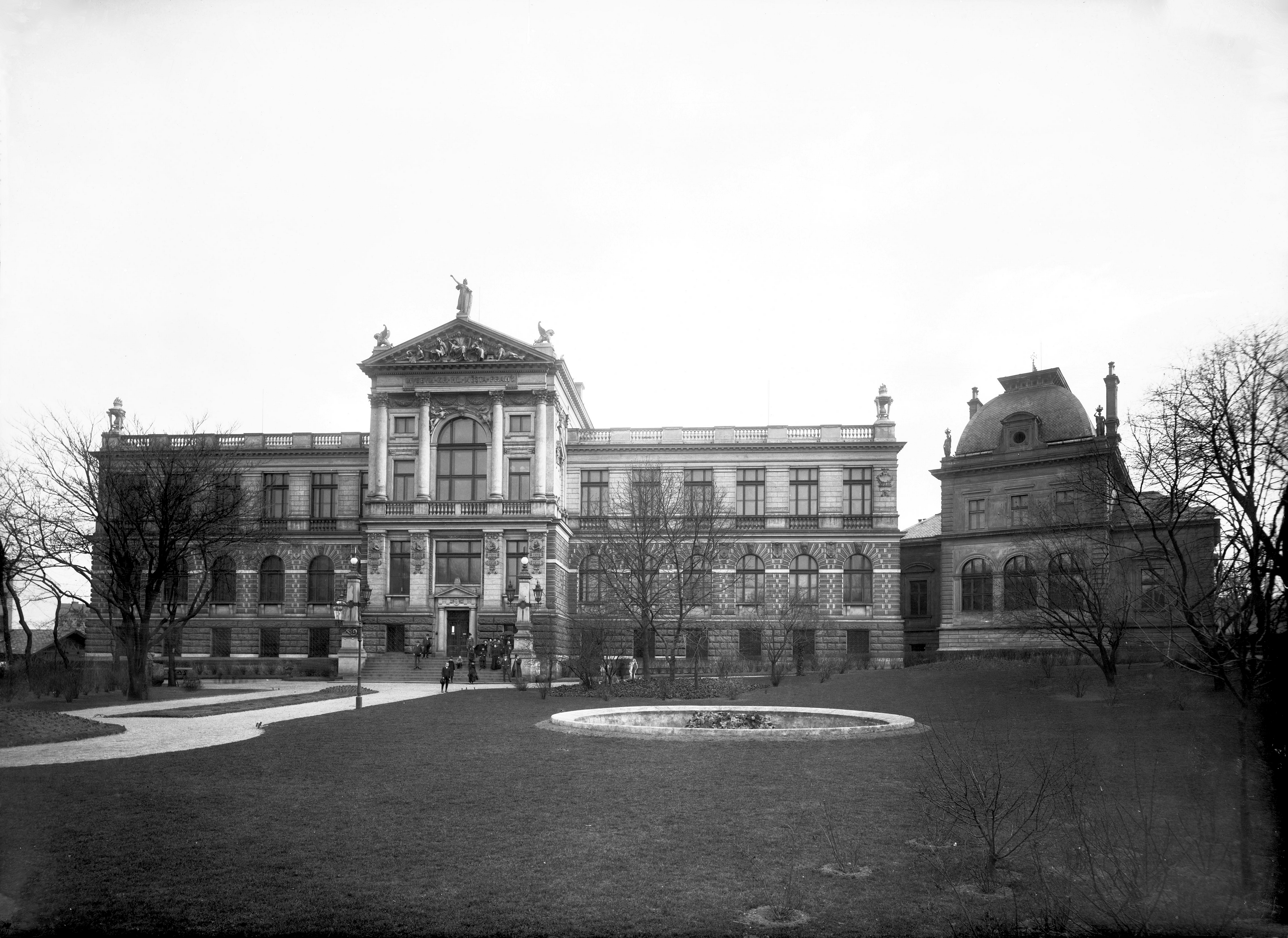 Budova Muzeum hlavního města Prahy včetně kavárenského pavilonu